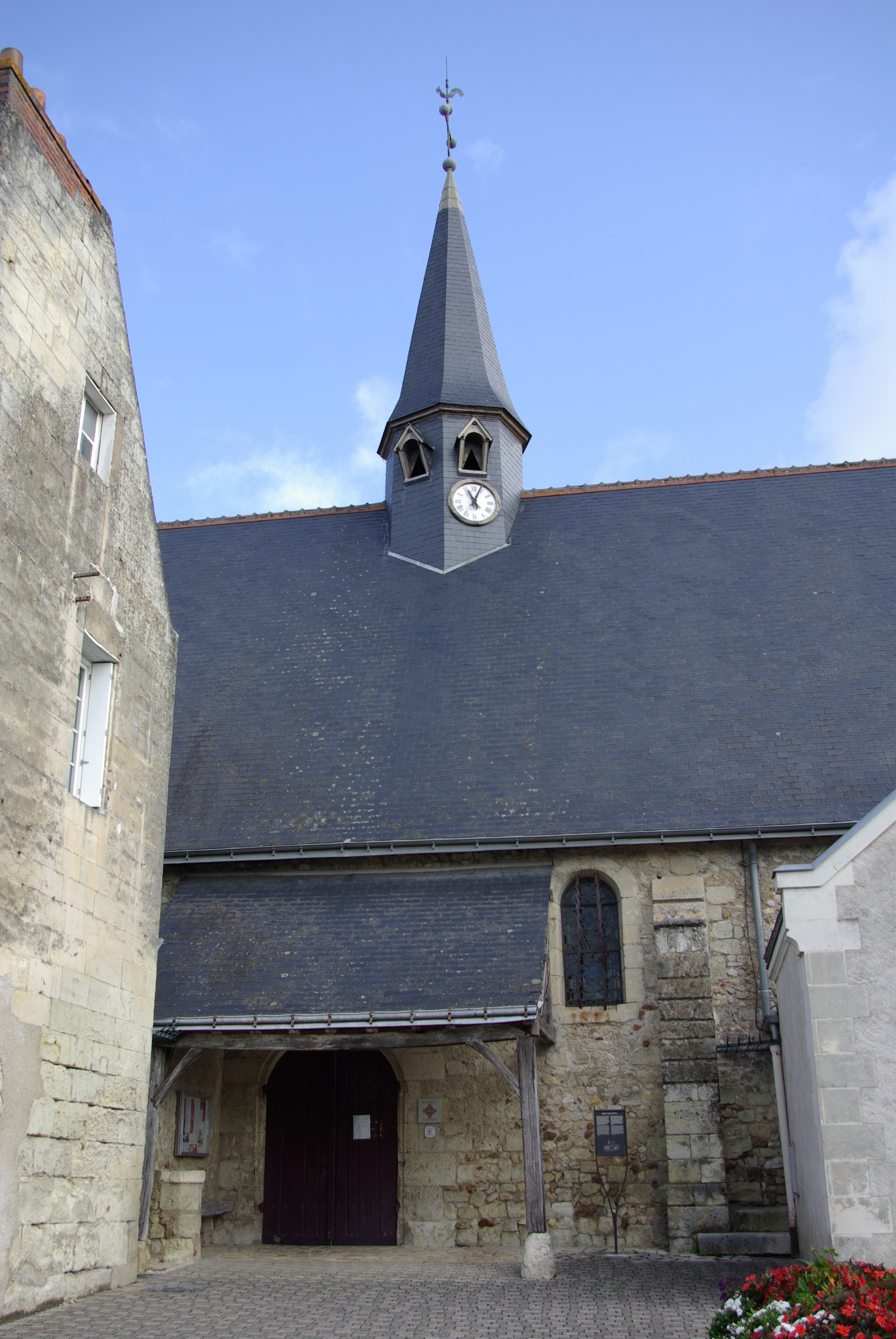 Église Saint-Pierre de Parçay-Meslay. This building is en partie classé, en partie inscrit au titre des Monuments Historiques. .